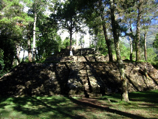 Candi Kethek, di lereng G. Lawu. Desa Gumeng, Kc. Ngargoyoso, Kab. Karanganyar, Jawa Tengah.